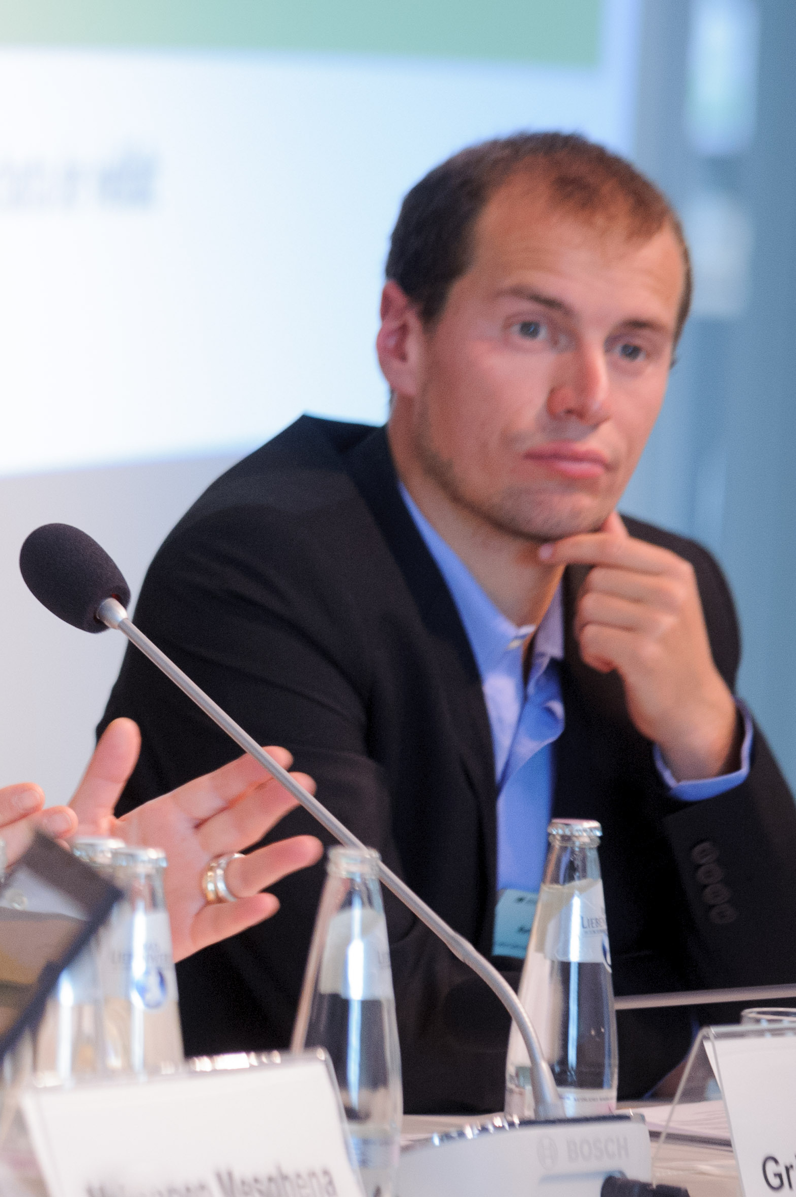 Martin Zierold (BVV Fraktion Berlin-Mitte, Bündnis 90/Die Grünen) bei der Fachtagung "Hochinklusiv! Zusammenhalt einer vielfältigen Gesellschaft" der Heinrich-Böll-Stiftung in Berlin / Germany